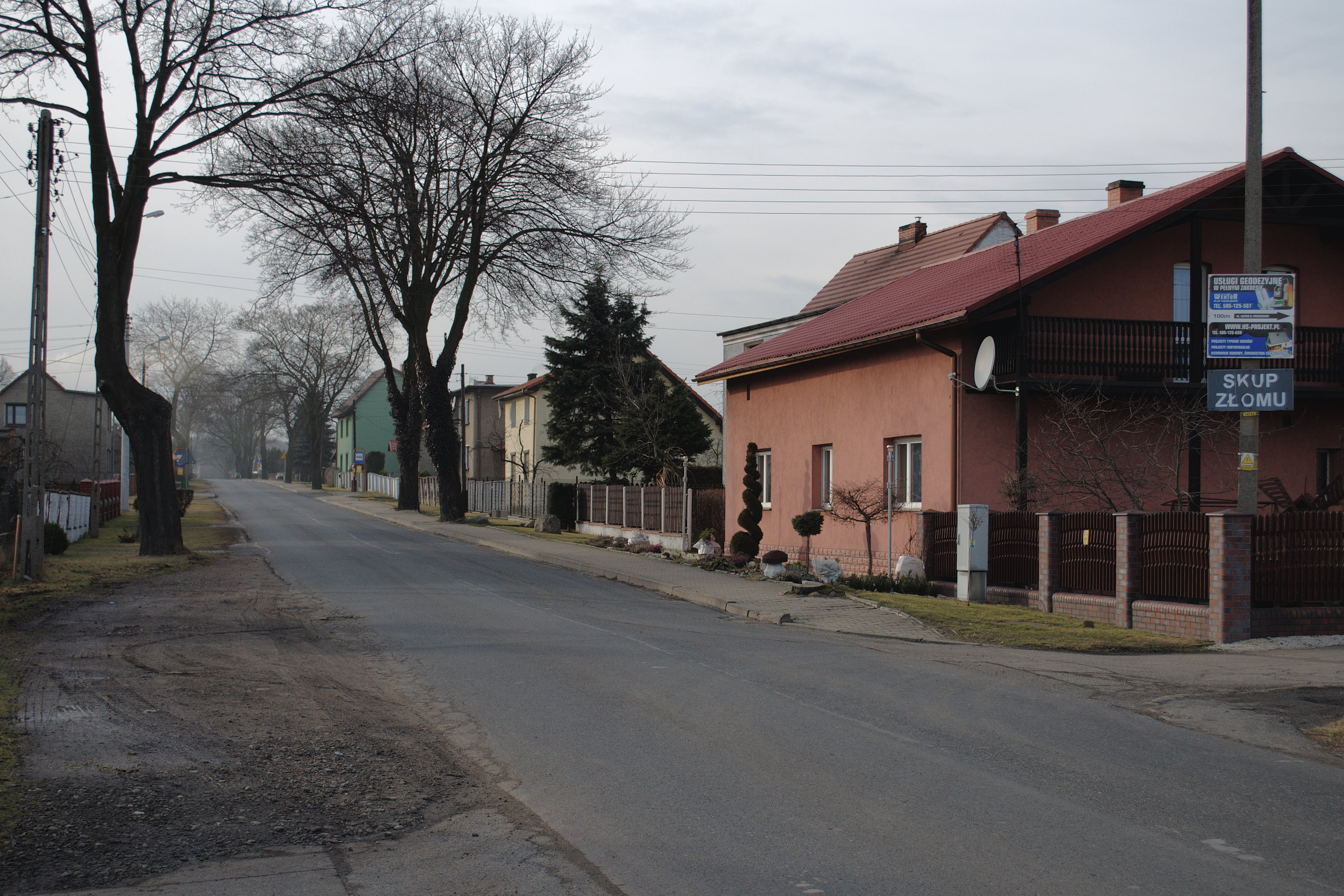 Przezchlebie. Ulica Mikulczycka.